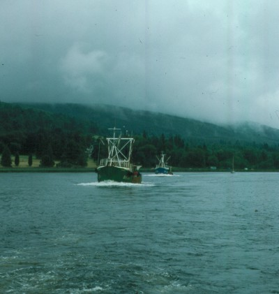 Fischkutter auf dem Lochness kurz vor der Einfahrt in den Caledonian Canal